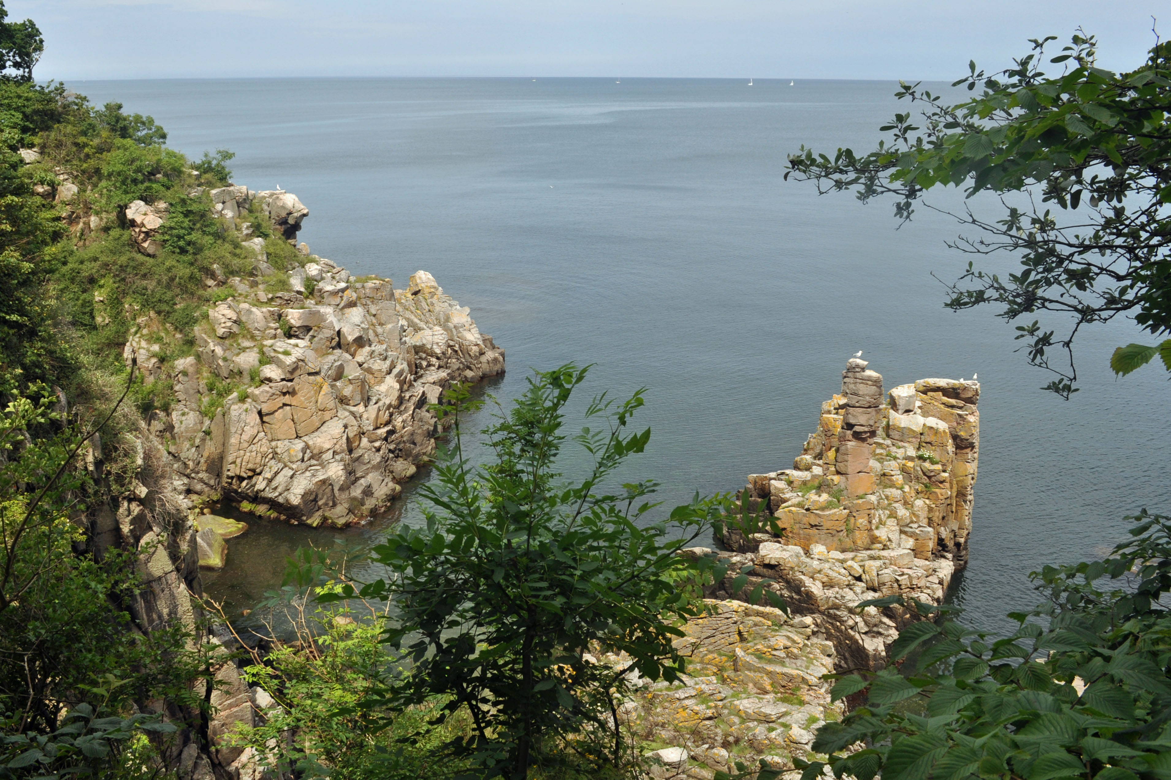 Heligdomsklipperne, Bornholm (2012-07-11), by Klugschnacker in Wikipedia (2)